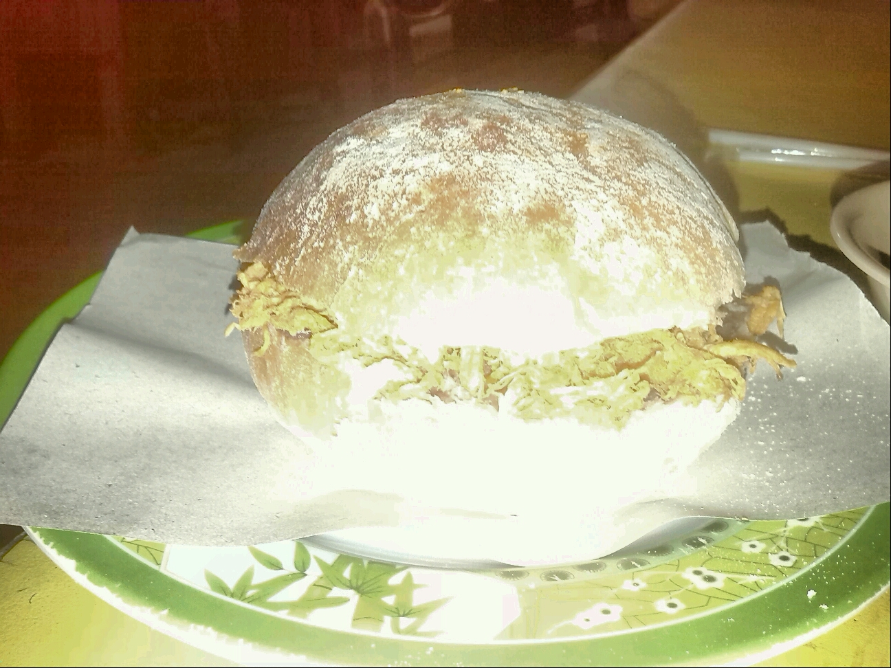 Antojito típico de Orizaba, Veracruz